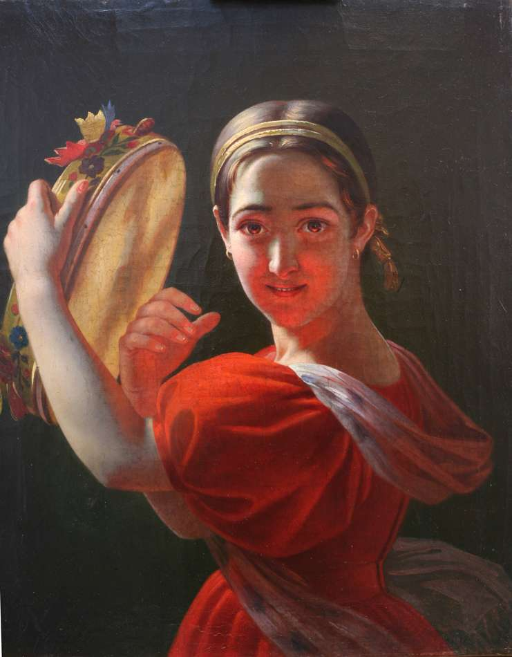 "Девушка с тамбурином" (Итальянка с тамбурином). 1836г. Холст, масло. 60х49. Кракелюр. За данную работу Т. был признан назначенным в академики в 1836 г. Выстав.:1836 г. -ИАХ, Спб; 1851 г.-Худож-ая, редких вещей. Воспр.: "Русская жанровая живопись", 1964 г. С.55, воспр. С. 33; П.А. Федотов, в картине "Разборчивая невеста" (ГТГ). Лит.: "Русская жанровая живопись", 1964 г., С. 50-53, 362, 375.№33; Т. Алексеева "Худож. школы Венецианова", 1958 г. С. 6,78,162,169,200; "Русское искусство. Очерки...", 1954 г. С. 616; "Венецианов в письмах", 1931 г., С. 18, 97;Сомов, 1899, С. 9; Сомов, 1876, №2,С. 11; Андреев,С. 561, "Выст. Рус. и запад. иск.. Жив., скул. и гр.".Кат. (Нов-ск,1976 г.).С.41. "Выс. рус, западн. и древнекит. иск. Жив. Гр. Ск. Прик. иск.".Кат. (Томск, 1979).С. 20. "Выс. рус, западн. и древнекит. иск. Жив. Гр. Ск. Прик. иск.".(Улан-Удэ,1980). С. 55. "Выст.101 шед-ов рус. и зап.реал.жив.". Кат. (под ред. Н.А. Кожина)(Северобайкальск.1980).С. 19. "Выст. рус.,укр., совет. и запд. иск.". Кат. (под ред. Н.А. Кожина). С. 25, 62."Выс.рус., укр. сов.,запд.иск.".Каталог (под ред. Горелова М.И).(Ивано-Франковск,1981).С.20. "Выст. рус.,укр., совет. и запд. иск.".(Лубны, 1983). С. 15,57.